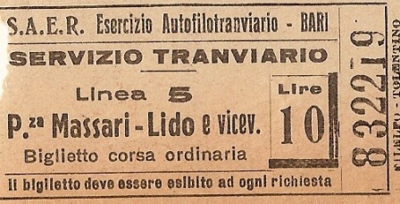 Bari - Ticket linea 5